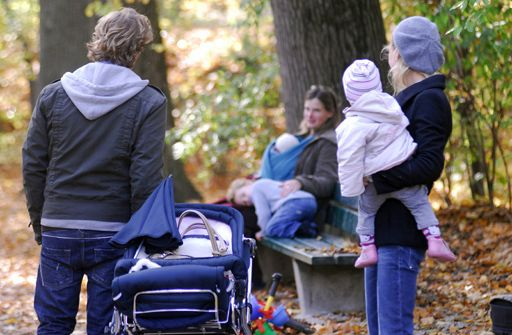 Familien